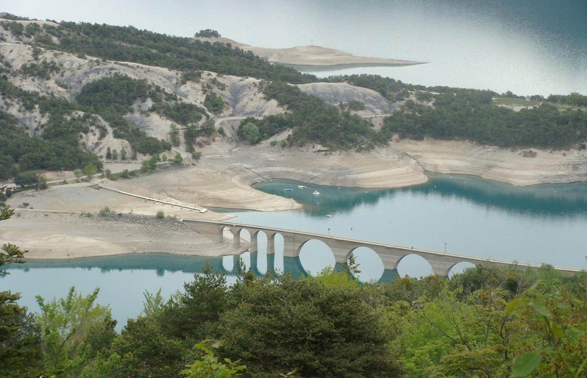 Le site de Chanteloube vu depuis la route de Chorges à Serre-Ponçon. Le chemin à gauche derrière la rampe d'accès au viaduc est l'ancienne plateforme de la ligne de Briançon (qui passait la pointe de Chanteloube en tunnel)